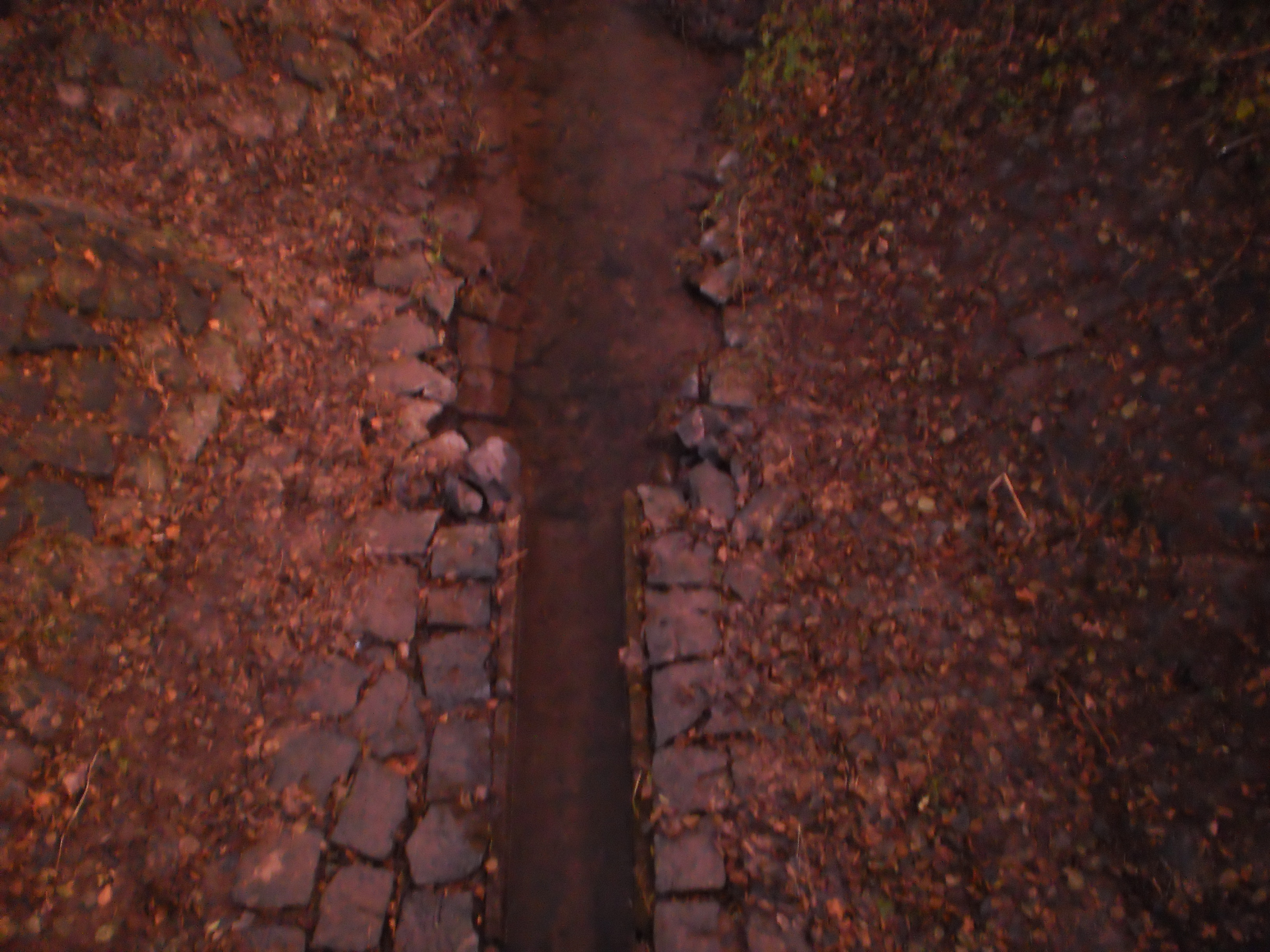 Das Marburger Bächlein Elnhauser Wasser (hier flussabwärts mit Niedrigwasser-Betonrinne für die Durchlässigkeit für Fische und Amphibien) scheint sehr stark schwankende Wassermengen aufnehmen zu müssen und hat daher einen breiten Brückendurchlass unter der Strassenbrücke der Kreisstrasse 68 für grosse Wassermassen nach Starkregen in einem weiten Abflussgebiet zur Allna hin. Die Flächen der Ortsteile Elnhausen (Kläranlage), Dagobertshausen, Dilschhausen, Wehrshausen und Neuhöfe liegen am Oberlauf dieses "Bächleins". Foto nicht allzuweit von der Mündung in die Ohe nahe Marburg-Hermershausen.